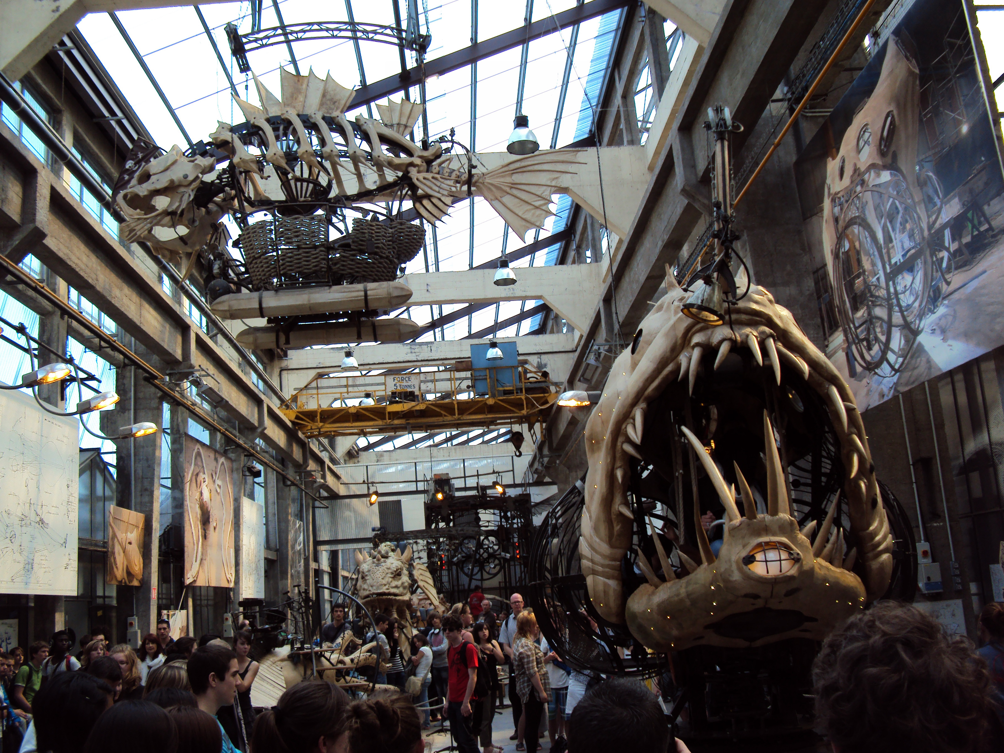 La galerie des Machines de l'îIe à Nantes en 2011